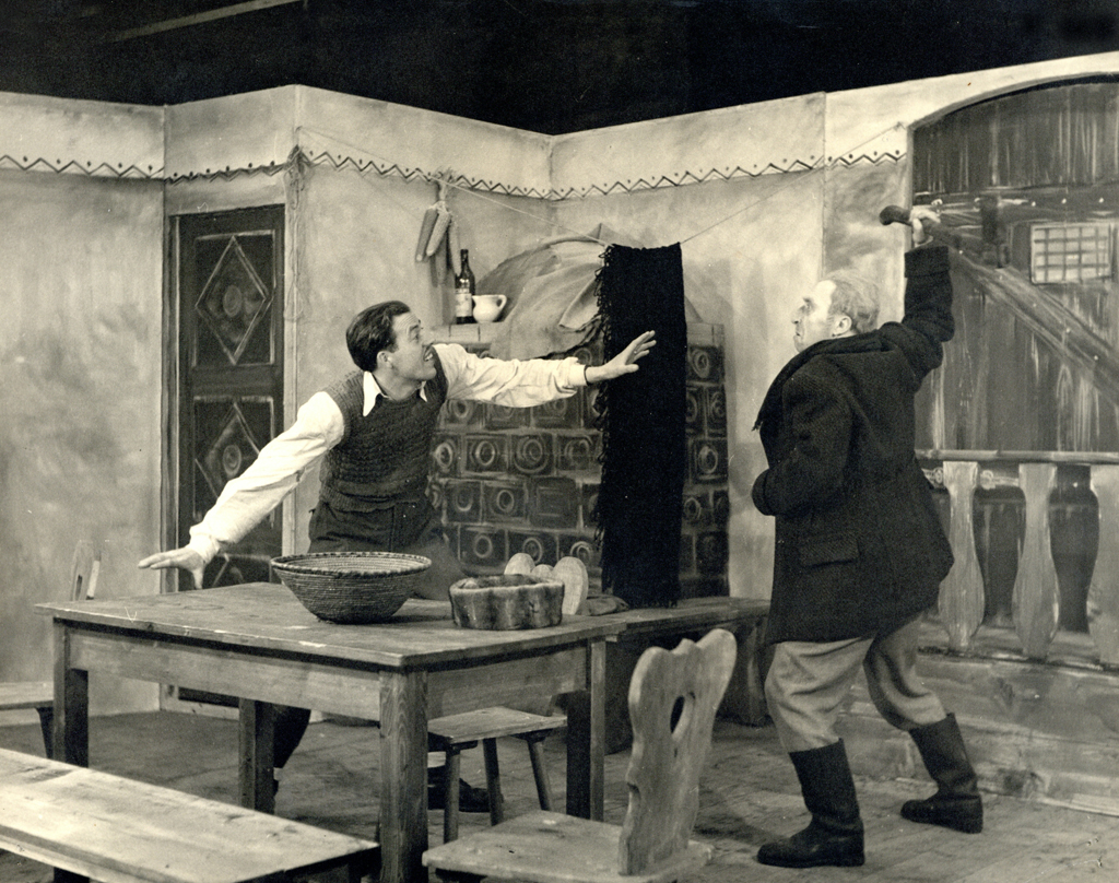 Matej Bor, Raztrganci, SNG za Trst in Primorje. Na fotografiji: Aleksander Valič (Ferlež), Just Košuta (Rutar).